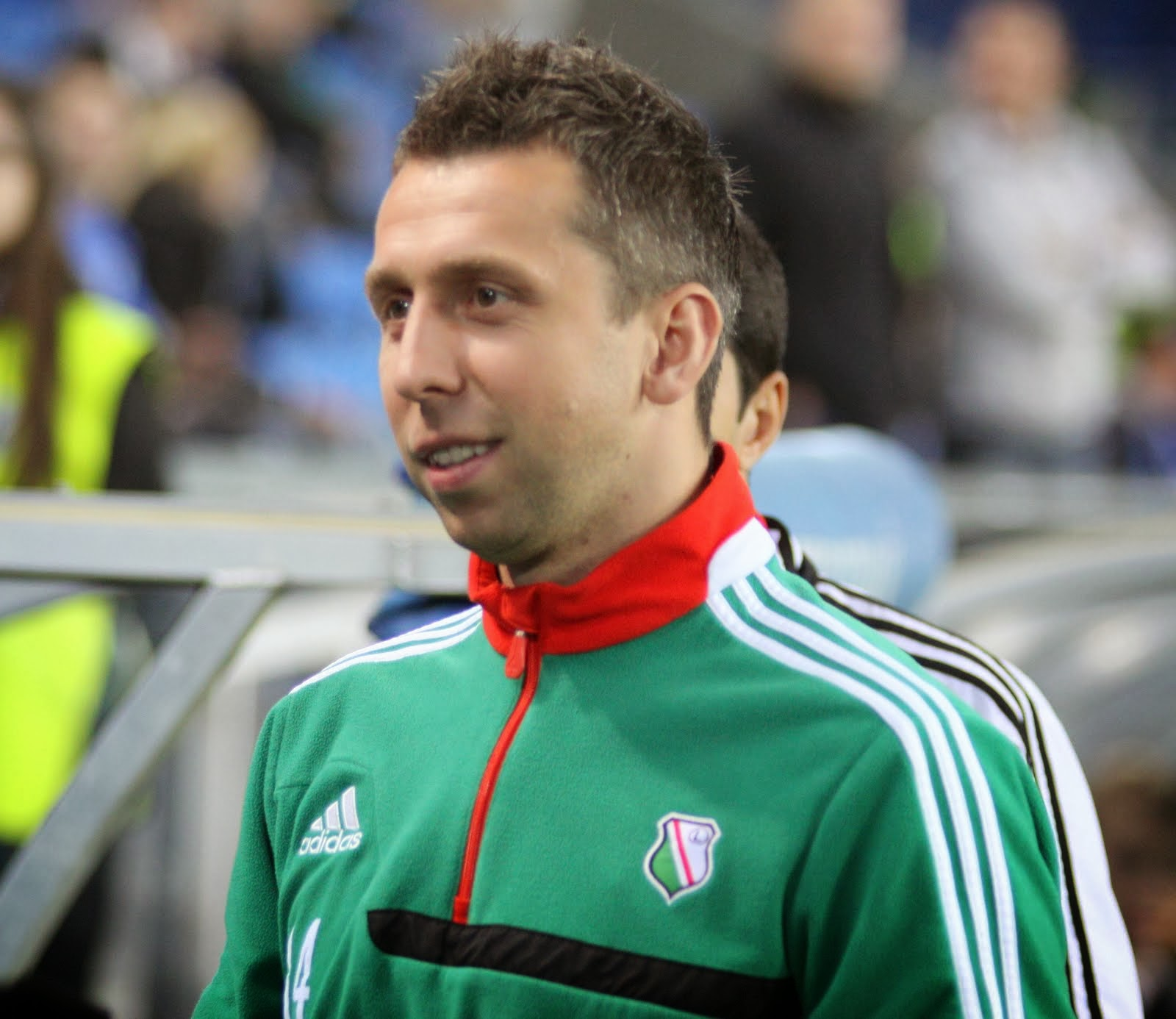 Jakub Wawrzyniak w barwach Legii Warszawa